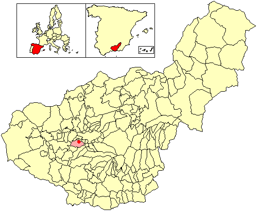 Situación de la localidad de Híjar (en el municipio de Las Gabias) respecto a la provincia de Granada, en España.